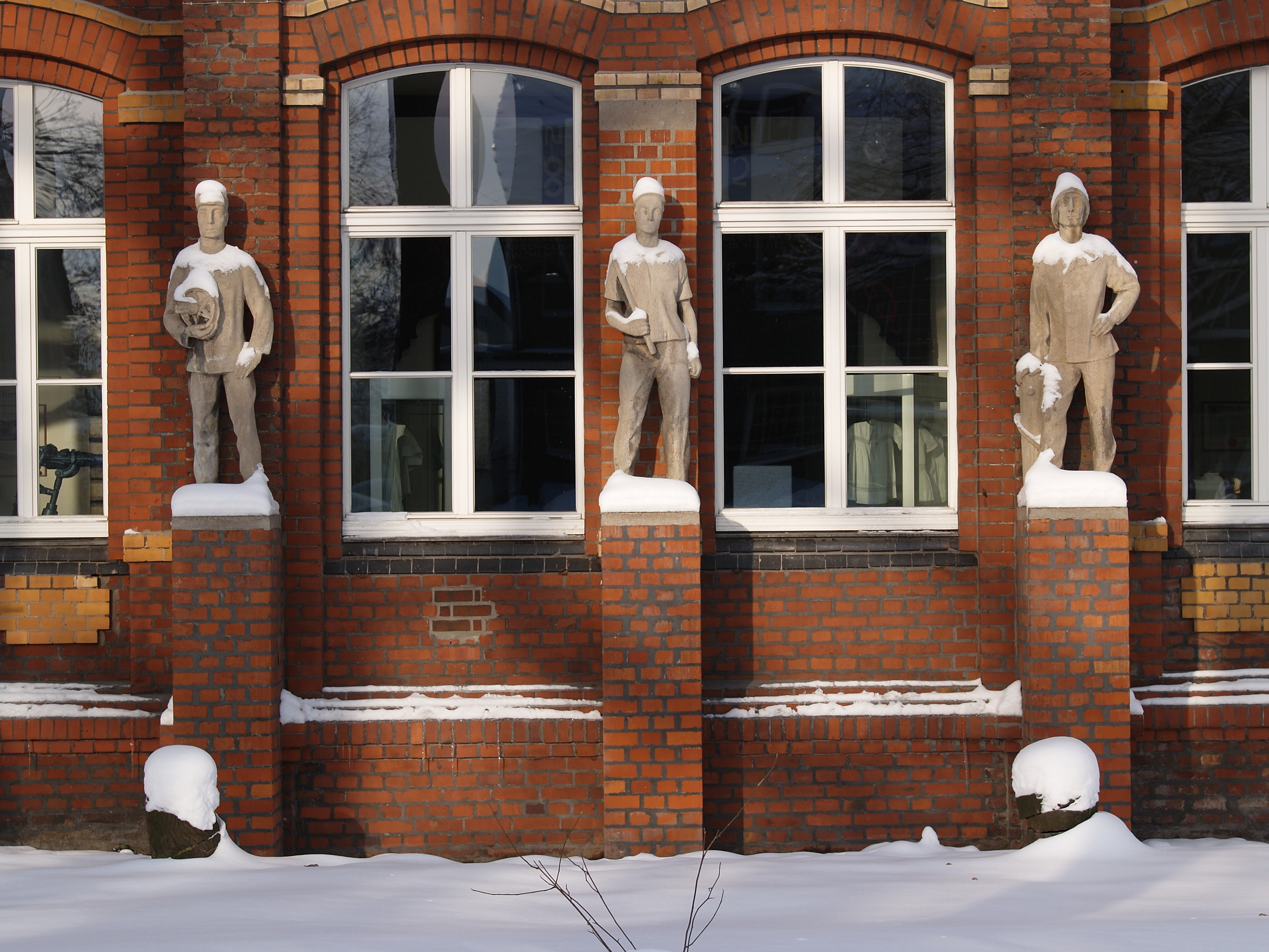 Emschertalmuseum Herne, die drei Männer (Eisenbahner, Bergmann, Schiffer) am Gebäude des Heimatmuseums im Stadtteil Unser Fritz, Ansicht von Süden